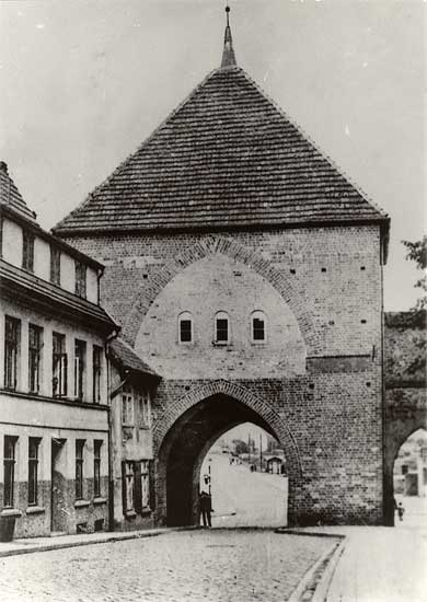 Rostock, Petritor